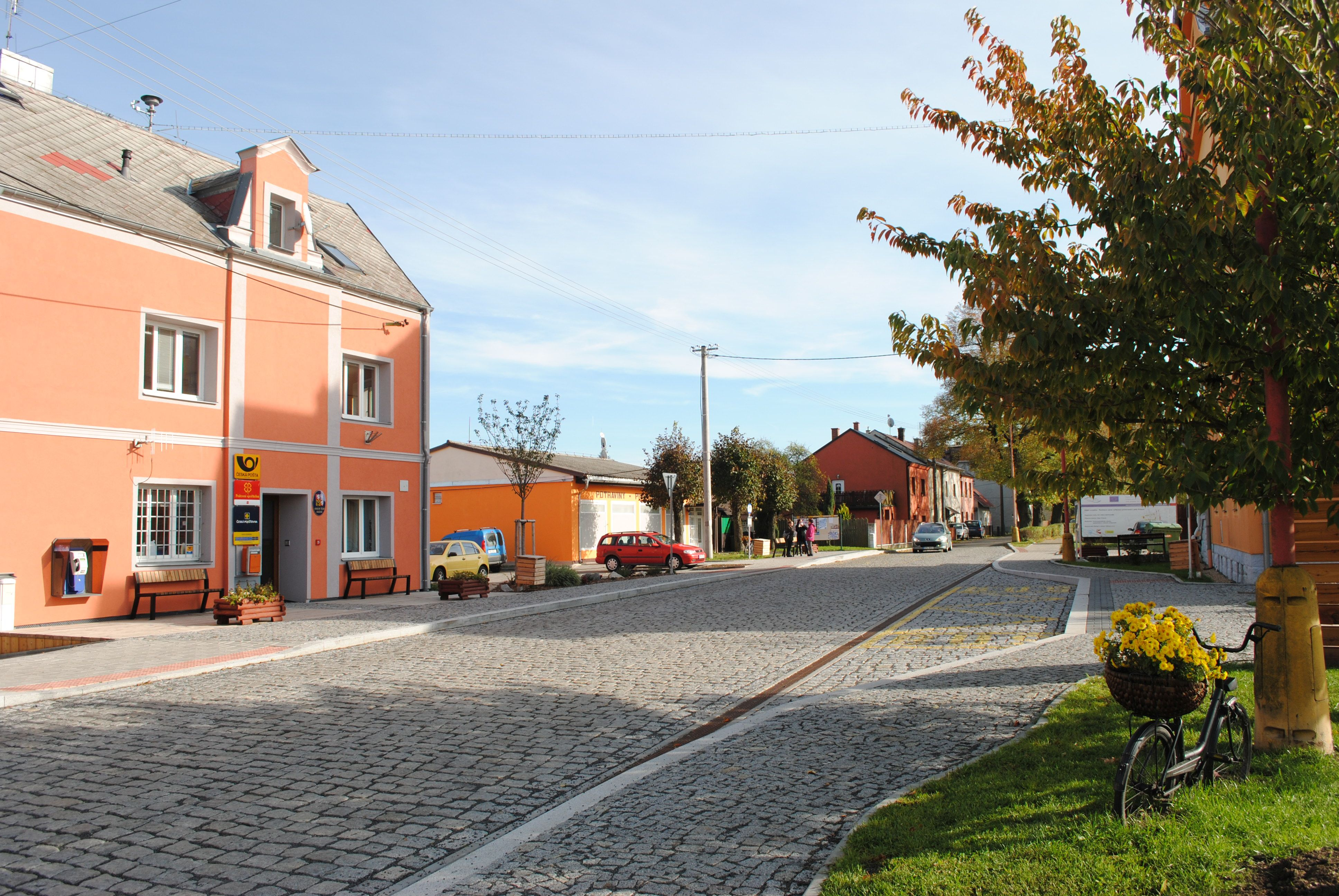 Strasse in Krasna (Cheb)